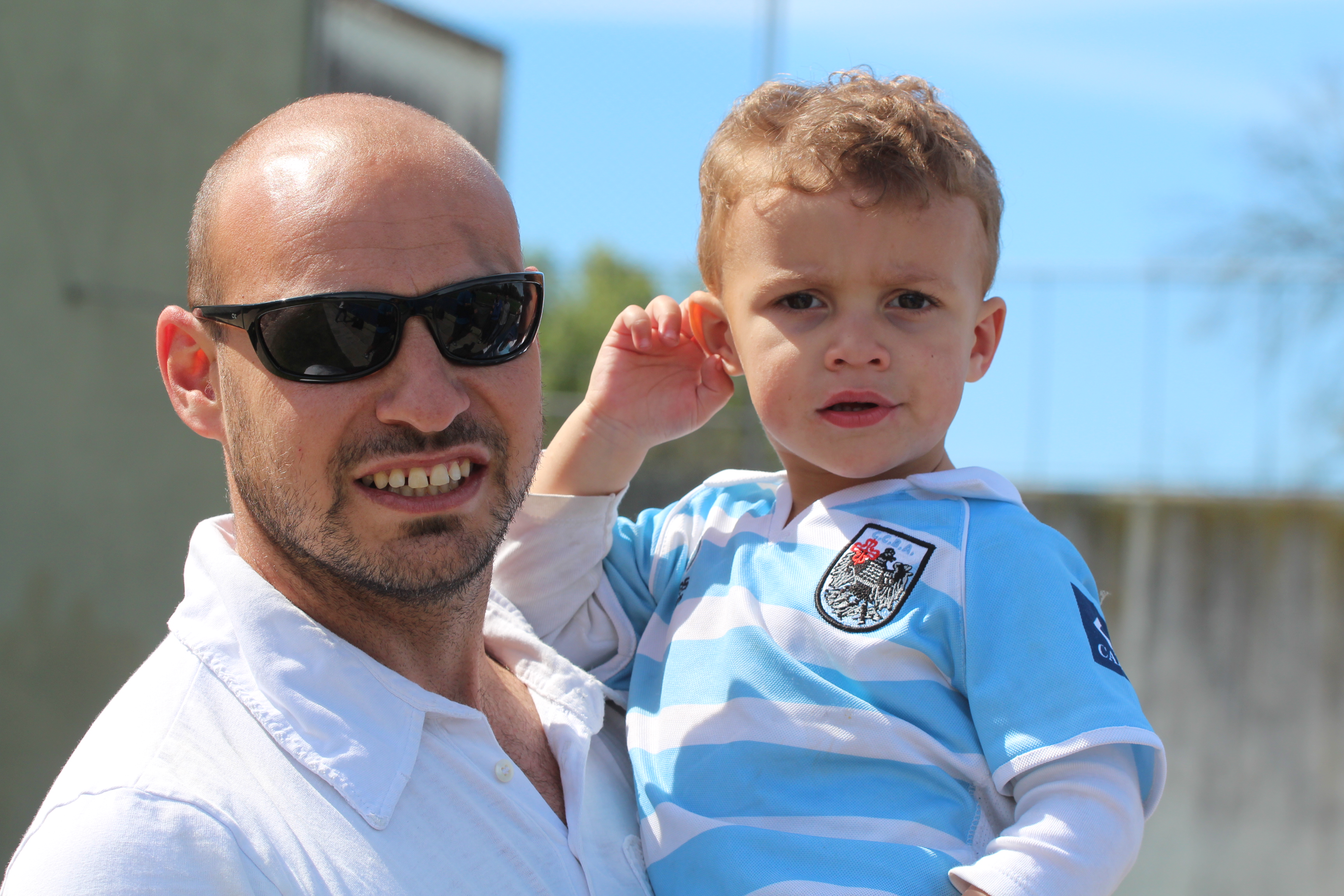 Fernando Oscaris